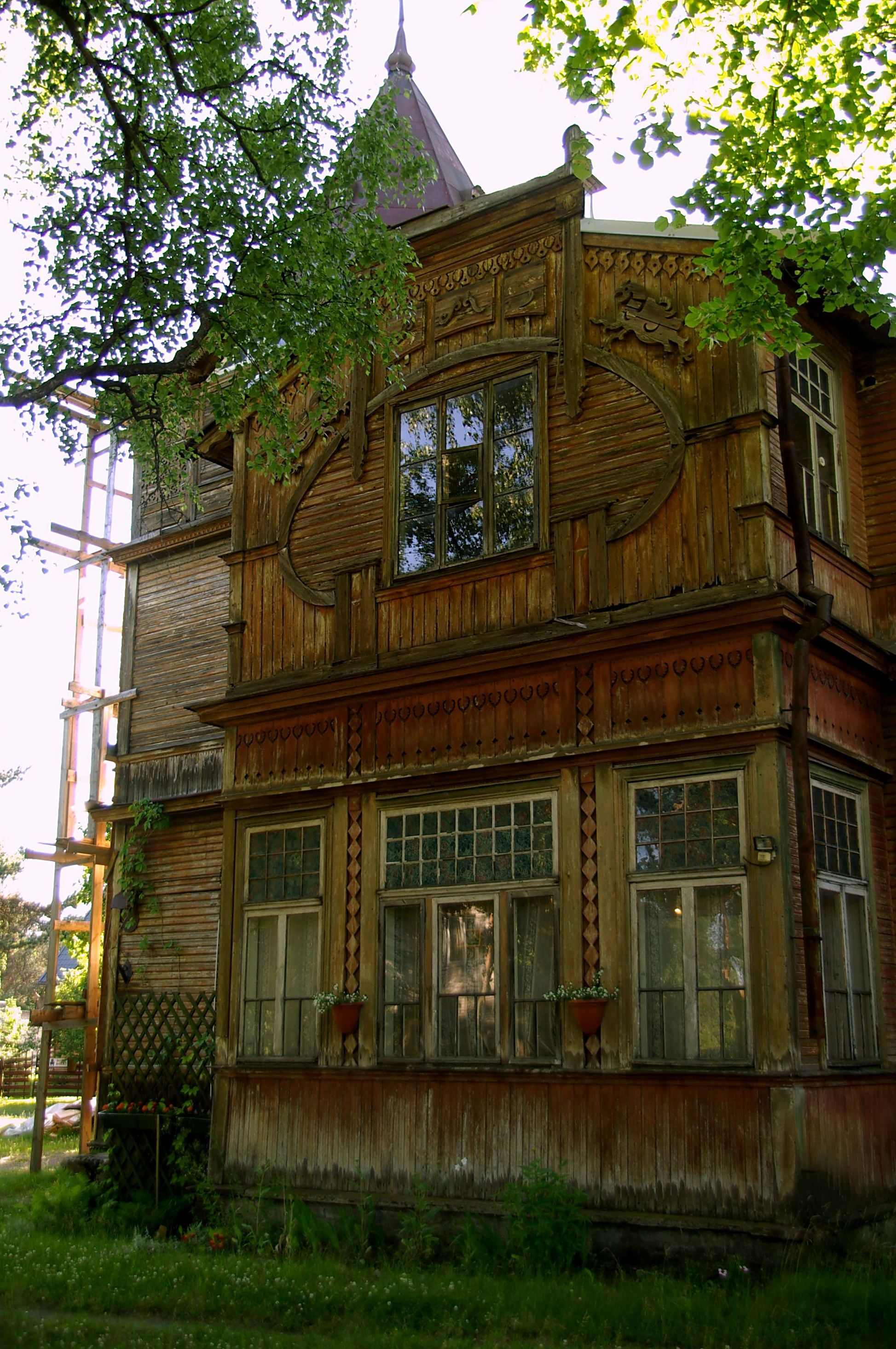 Harju maakond, Tallinna linn, Nõmme linnaosa Pärnu mnt 492